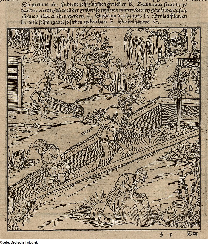 Original image description from the Deutsche Fotothek Bergwerk & Bergbau & Verhüttung & Hüttenwesen & Aufbereitung & Erzwäsche